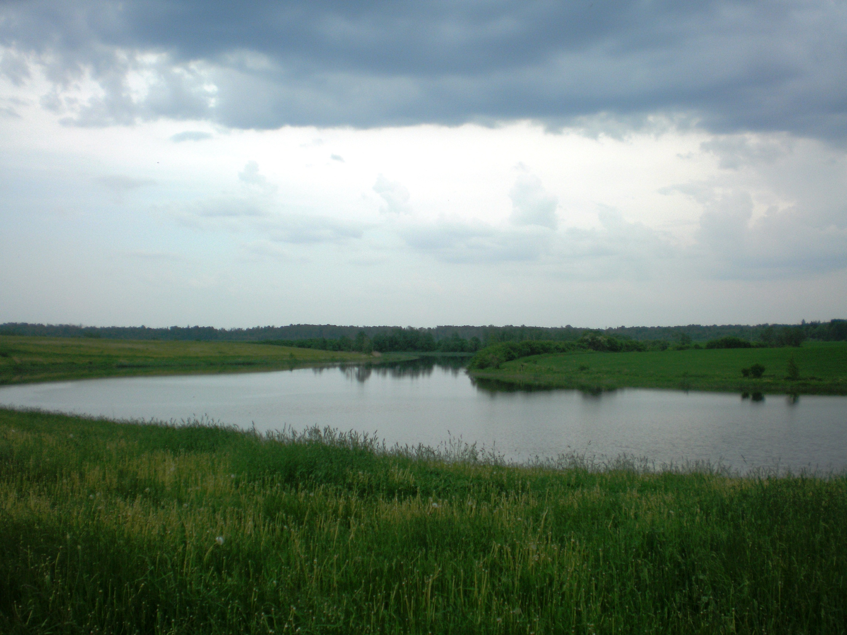 Labūnavos tvenkinys